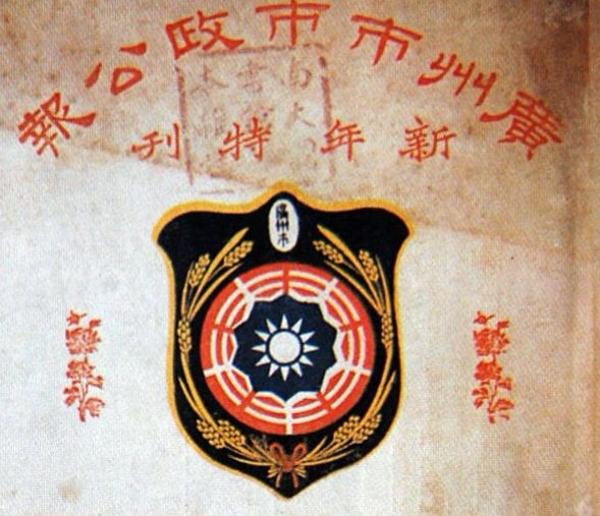 中華民國廣州市政府刊發的《廣州市市政公報》新年特刊封面上的廣州市徽。